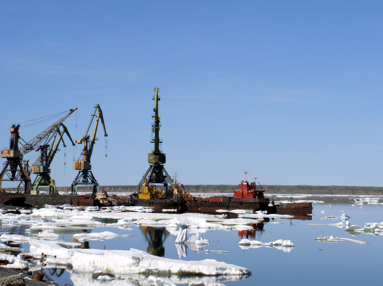 Причал порта Певек